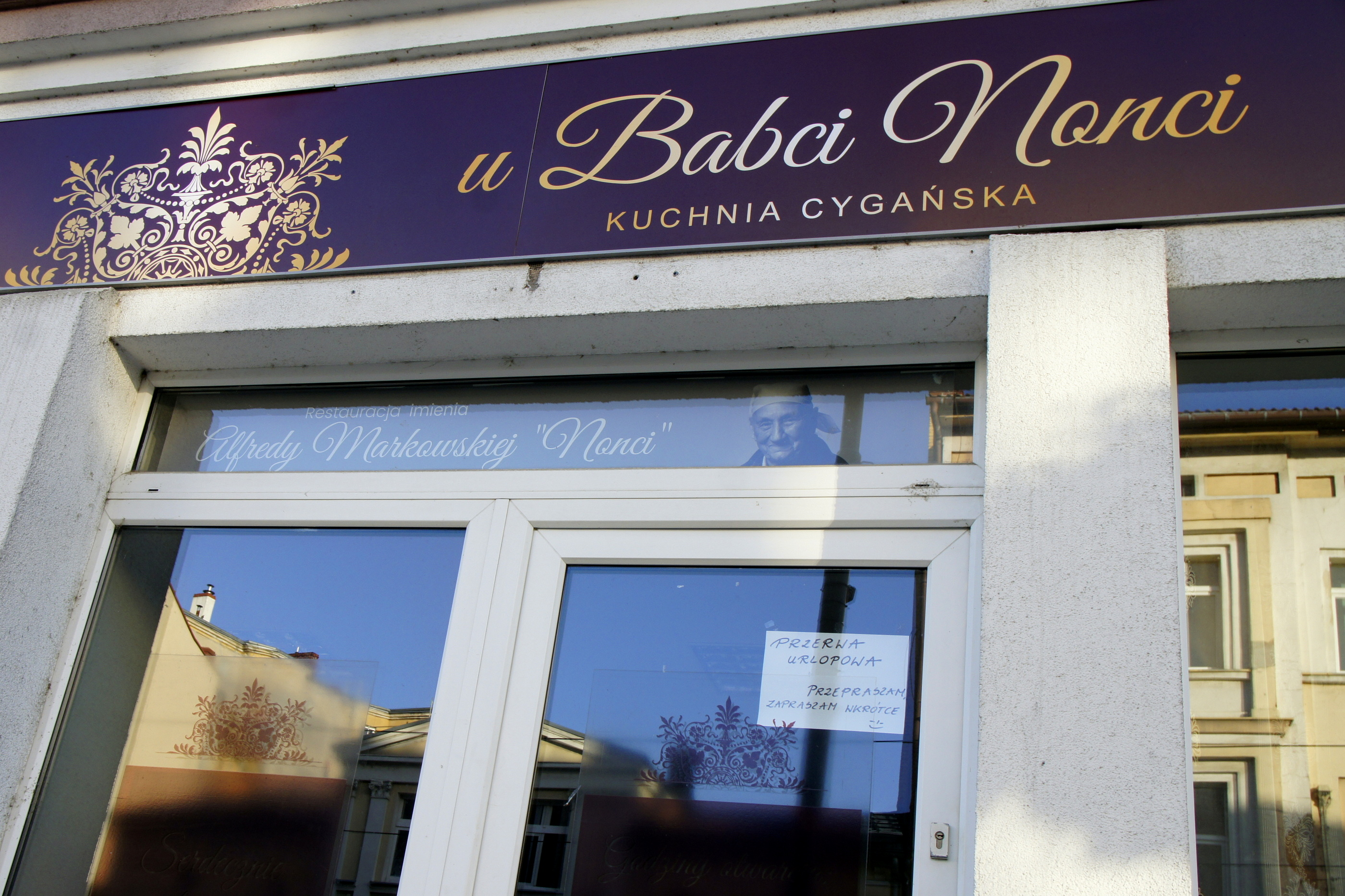 Gorzów Wlkp. Restauracja z kuchnią cygańską "U Babci Nonci" przy ul. Chrobrego. Alfreda Markowska czyli Babcia Noncia, w czasie II wojny światowej - na podkarpaciu - ocaliła około pięćdziesięcioro dzieci romskich i żydowskich, w tym przyszłego rzeźbiarza i literata, Karola Parno Gierlińskiego. Jest Honorową Obywatelką miasta